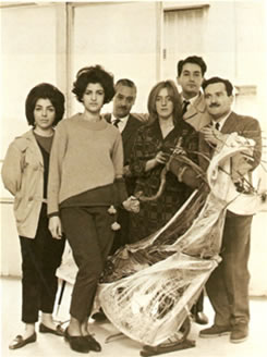 Dalila Puzzovio y su obra La Novia Abandonada de 1962